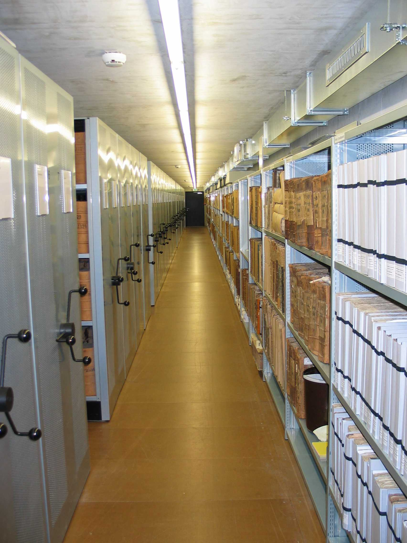 Aktenbestände im 2003 fertiggestellten Tiefspeicher des Vorarlberger Landesarchivs.